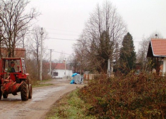 Црвена Јабука.